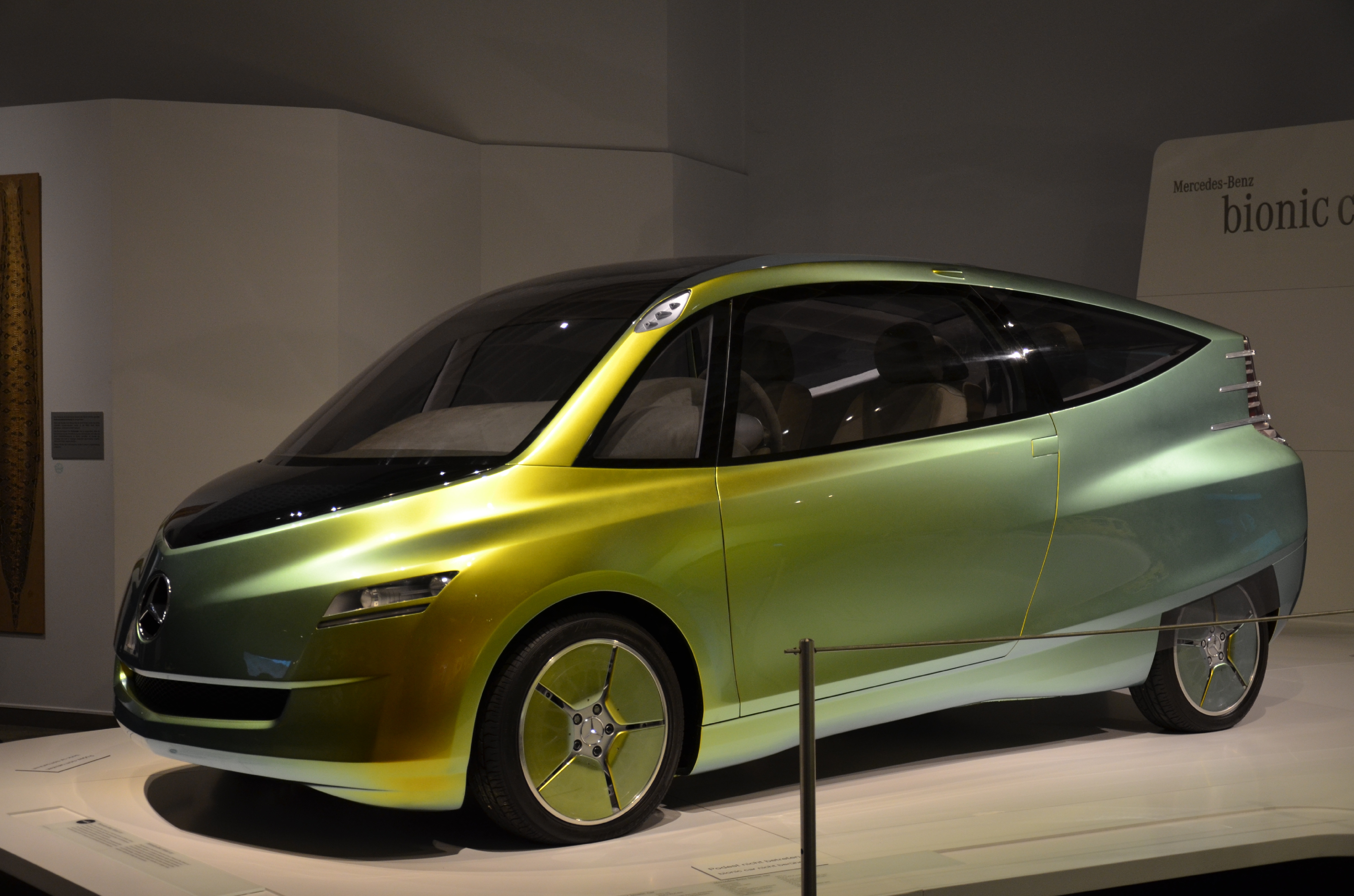 Mercedes-Benz bionic car in der Bionik-Ausstellung des LWL Naturkundemuseums in Münster, 2012